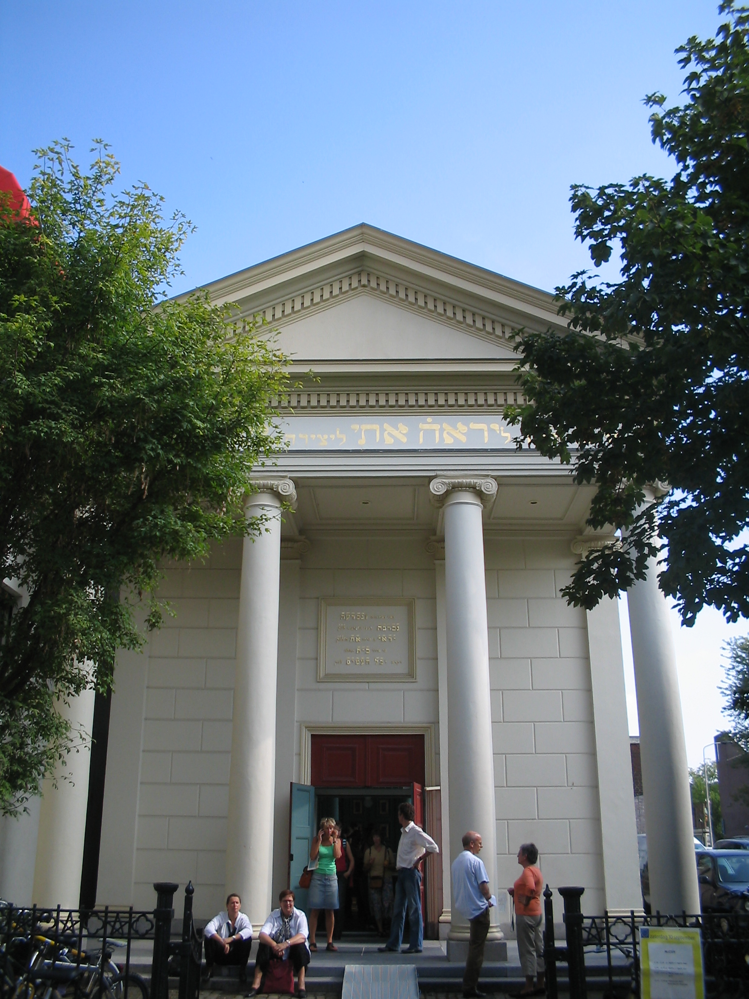 Synagoge, Delft. Sept. 2005